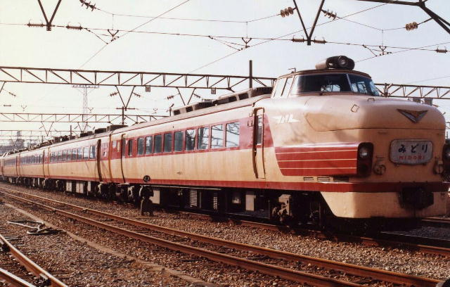 ｸﾛﾊ481-1「みどり」みなみ福岡電車区にて撮影